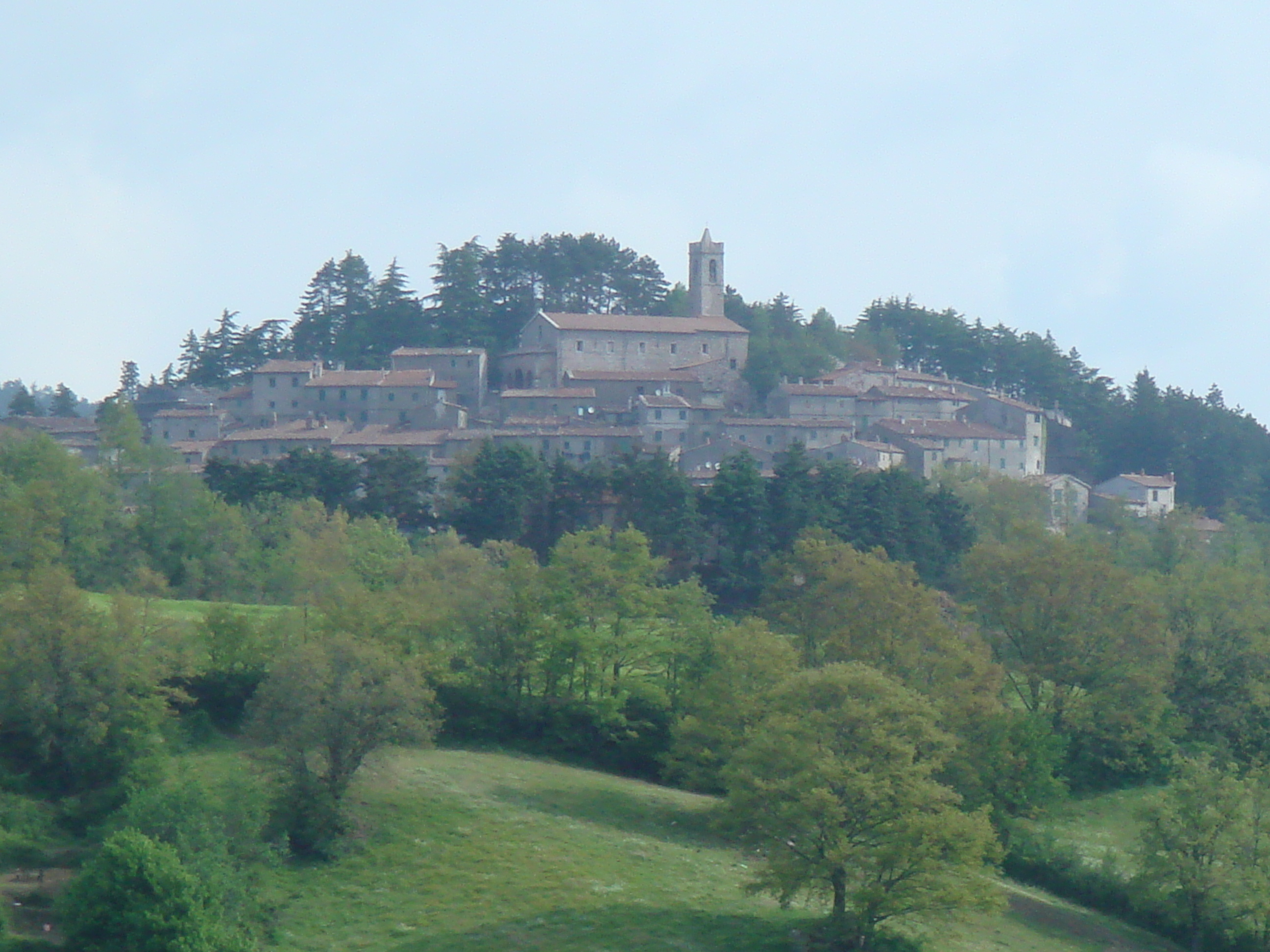 Vista de la "frazione" de Gerfalco, Montieri, Italia